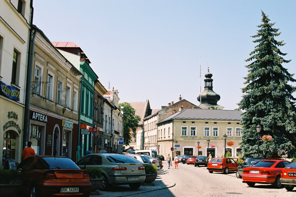 Autorem zdjęcia jest Przemysław Niepokój-Hepnar